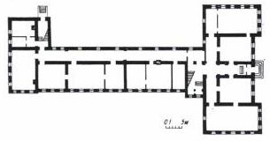 БДСГА. Фізіка-хімічны корпус. План першага паверха.